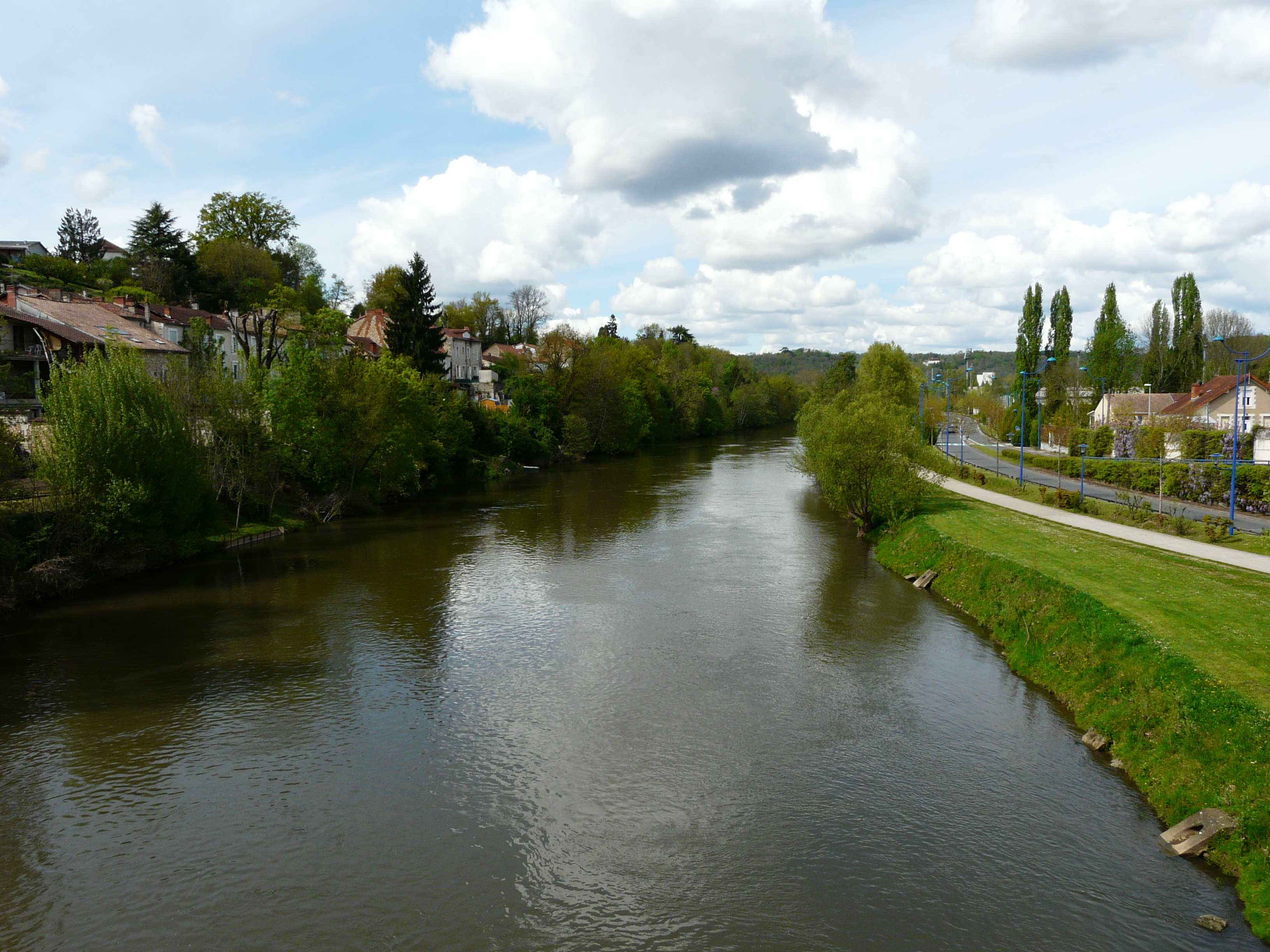 L'Isle en aval du pont de la Cité, entre Coulounieix-Chamiers (à gauche), et Périgueux (la voie des Stades, à droite) ; Dordogne, France.